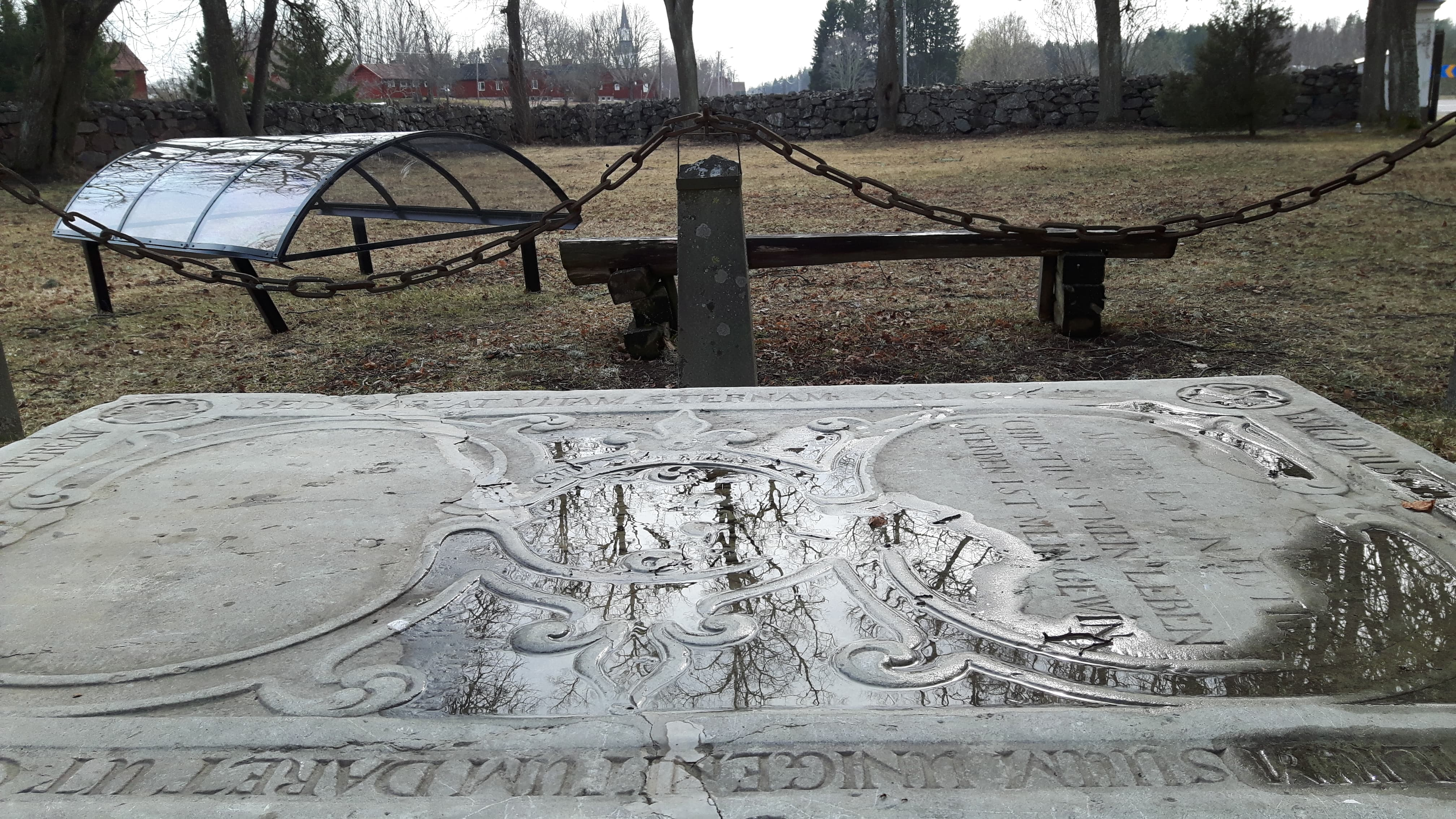 Welam Werviers renässansgrav i Västlands bruk. Wervier var vallonsk järnhandlare, arrendator och bruksägare av Västlands bruk samt grundare av Strömsbergs bruk. Här låg tidigare en medeltida kyrka som revs på 1850-talet. I bakgrunden skymtar Västlands bruk och Västlands nya kyrka.